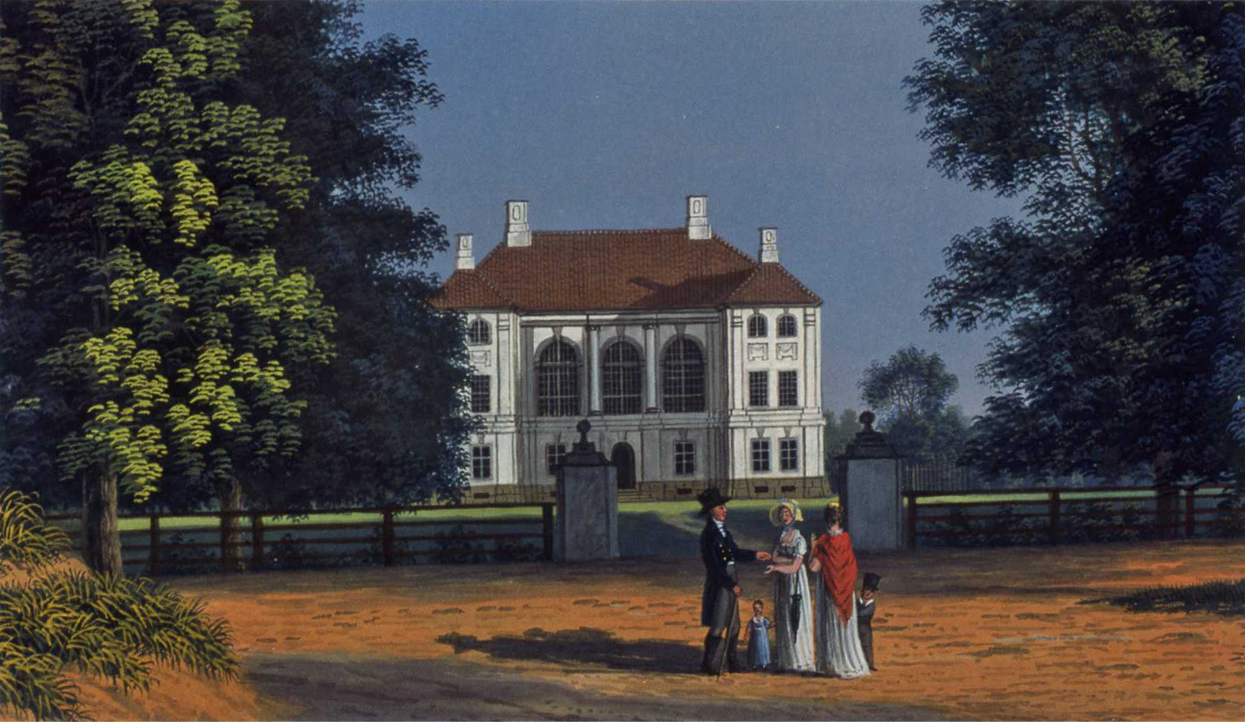 Schloss Holstein in Friedrichshof, Ostpreußen, Arnold Nering, um 1830 (Ausschnitt)